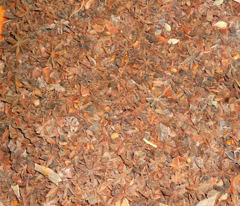 തക്കോലം